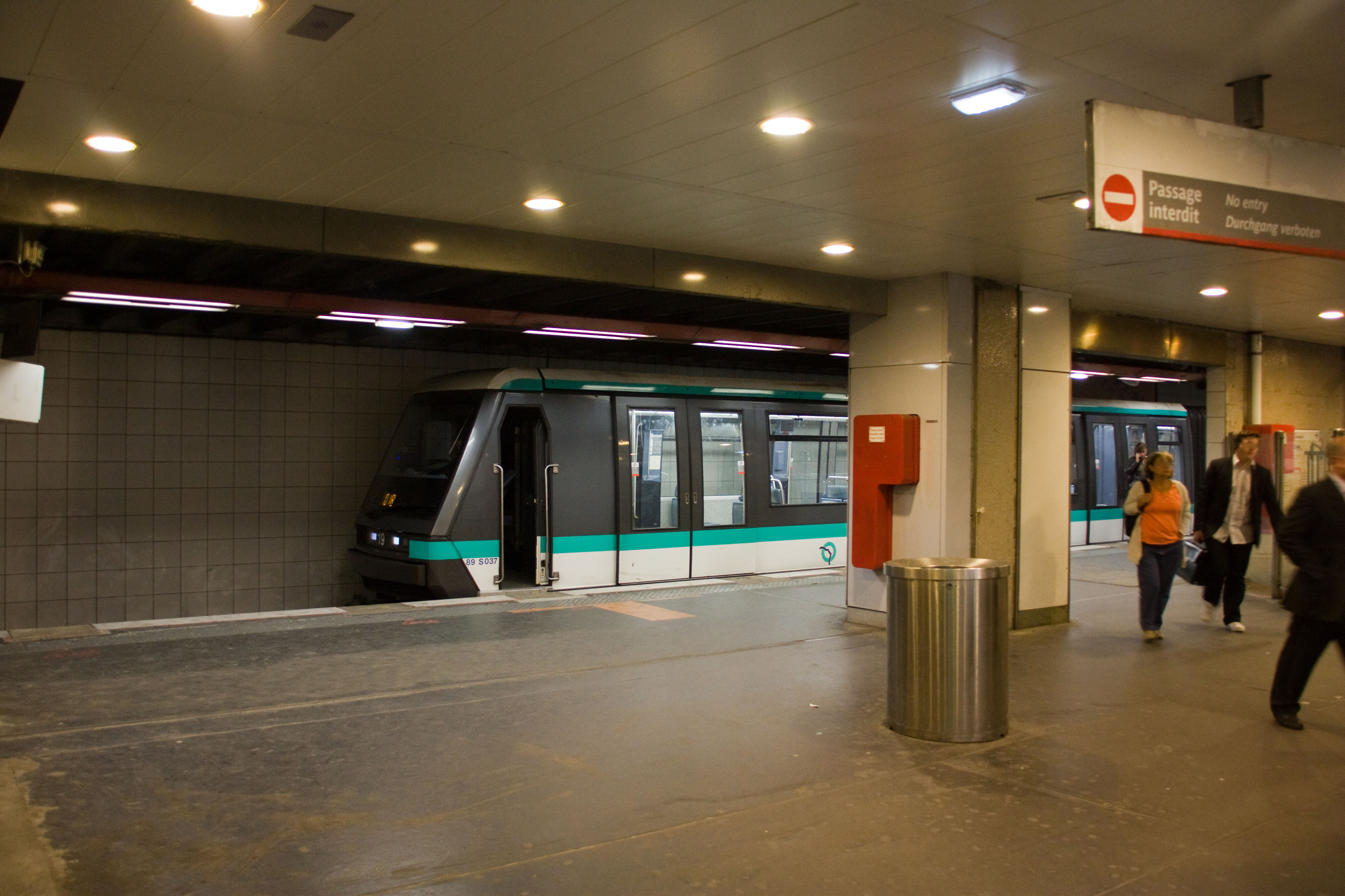 Station Grande-Arche de La Défense, Ligne 1 métro de Paris. (Sortie de la sation, niveau RER A, sortie ouest)